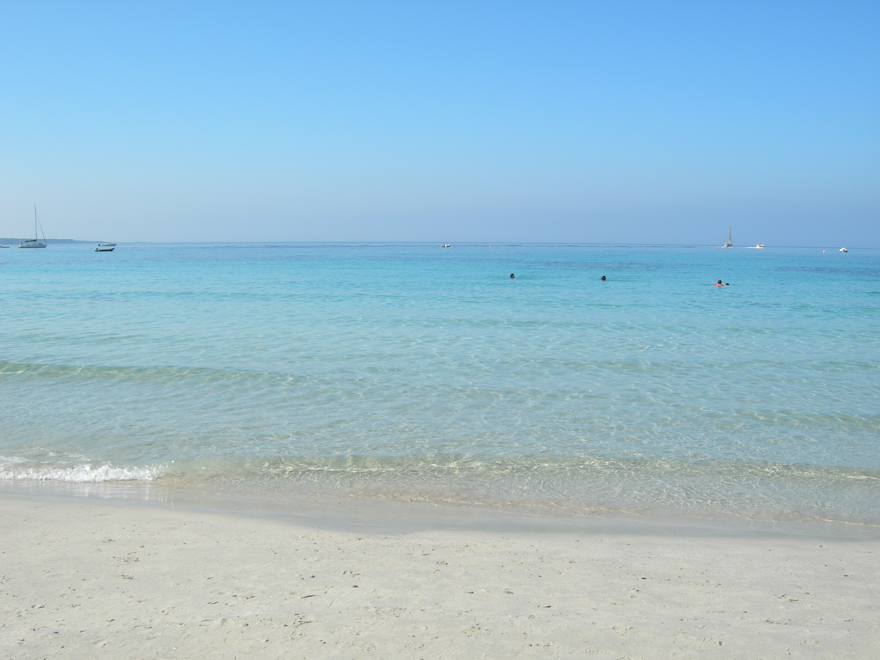 putzu idu